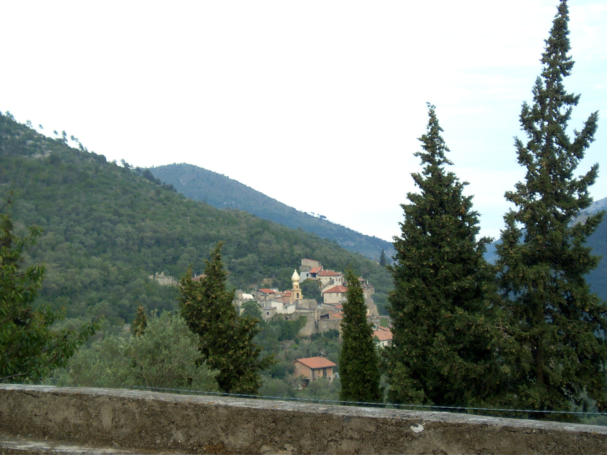 Castelbianco, frazione Vesallo